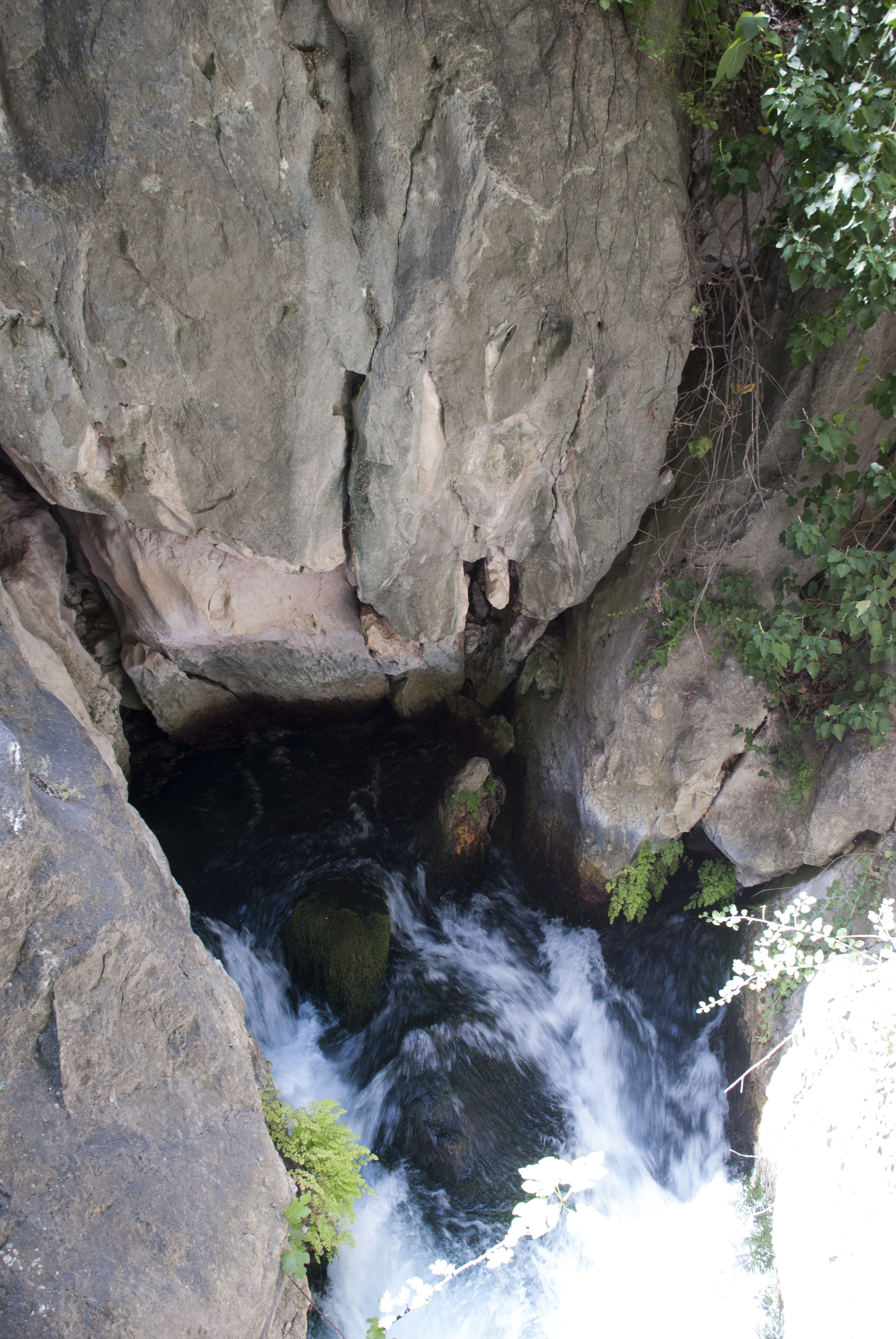 Saklıkent Kanyonu içindeki Karstik kaynak. (Karst spring)